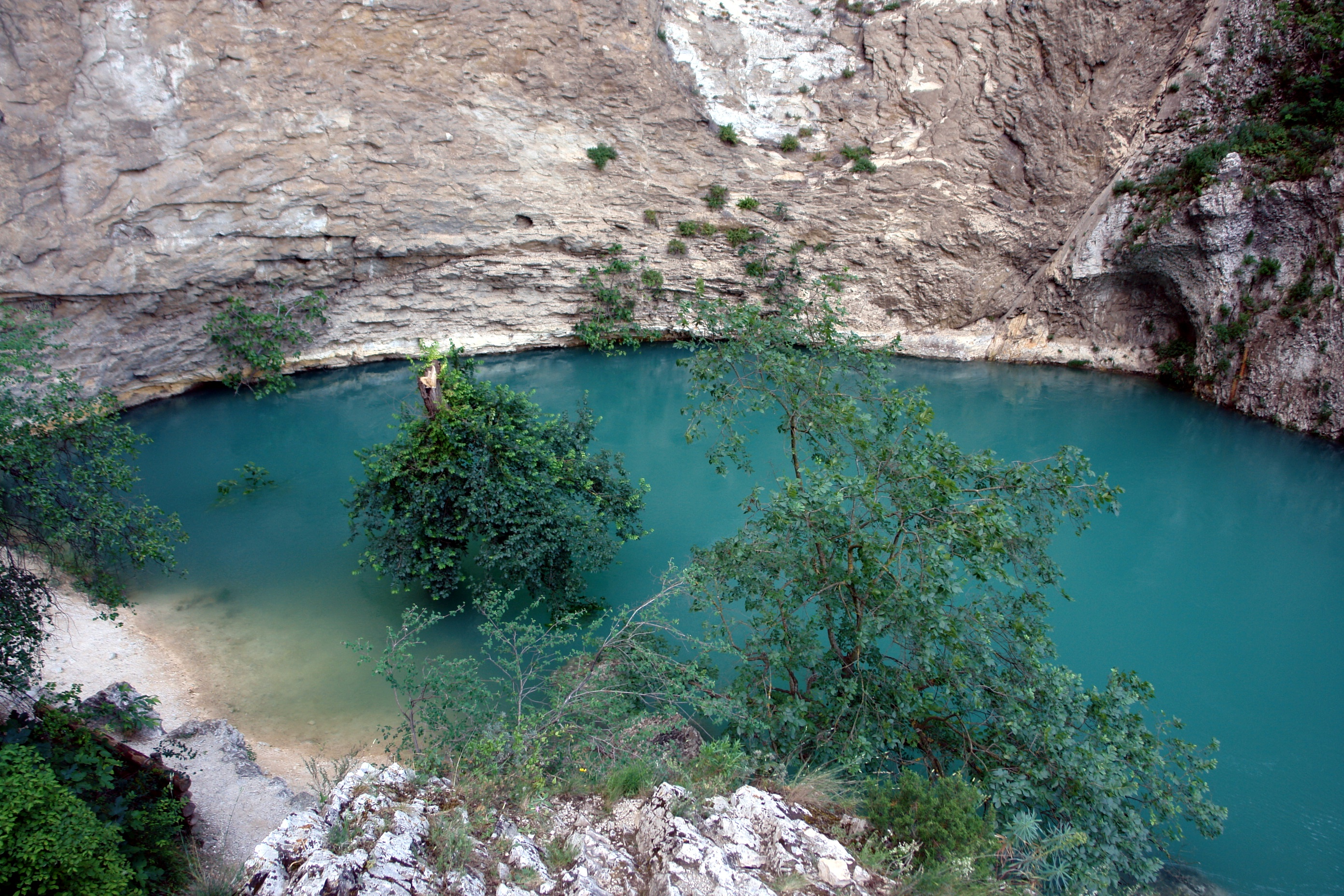 Fontaine de Vaucluse en crue.